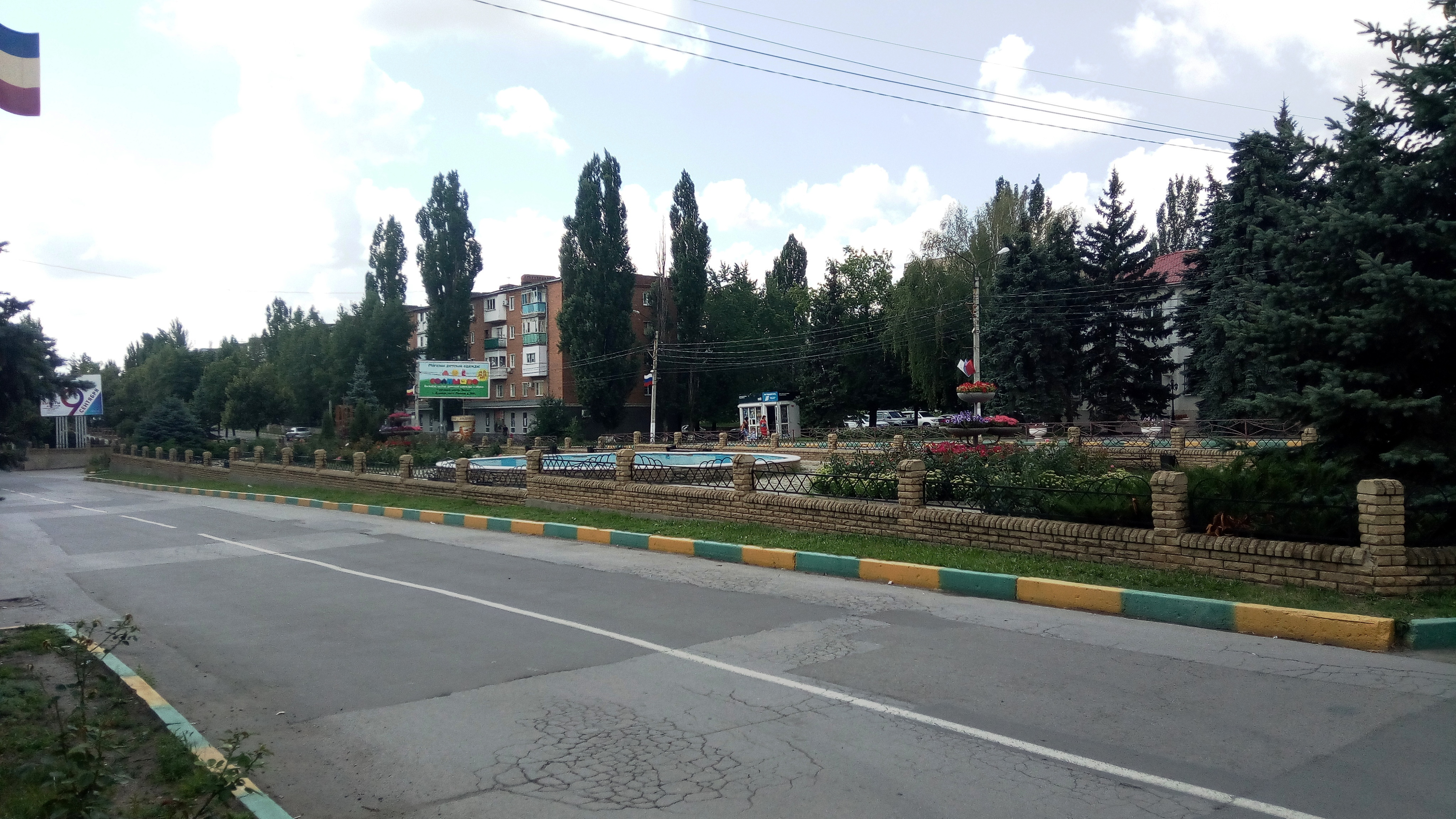 Проспект Ленина (Донецк РФ)